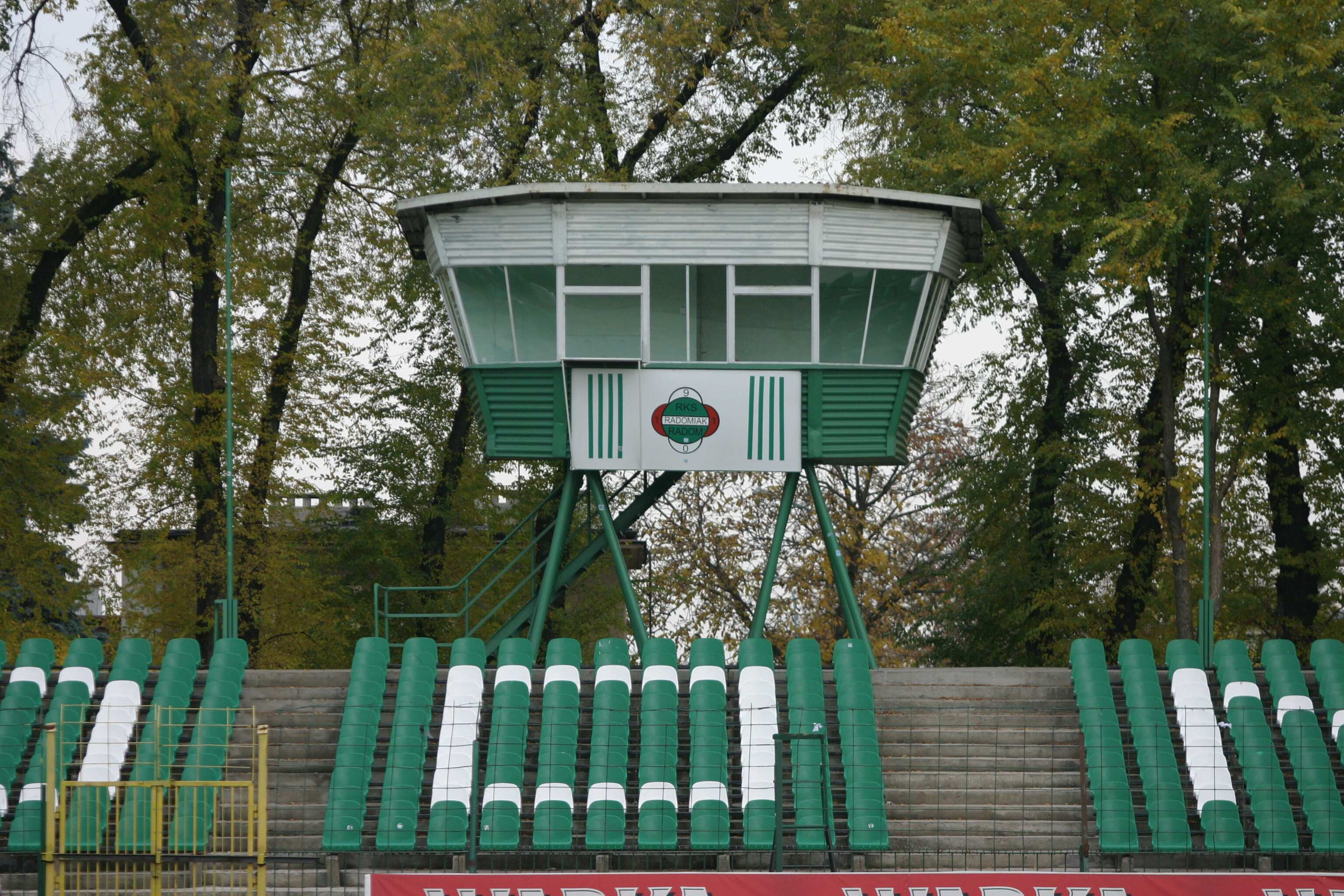 Stadion RKS Radomiak, budka komentatorska